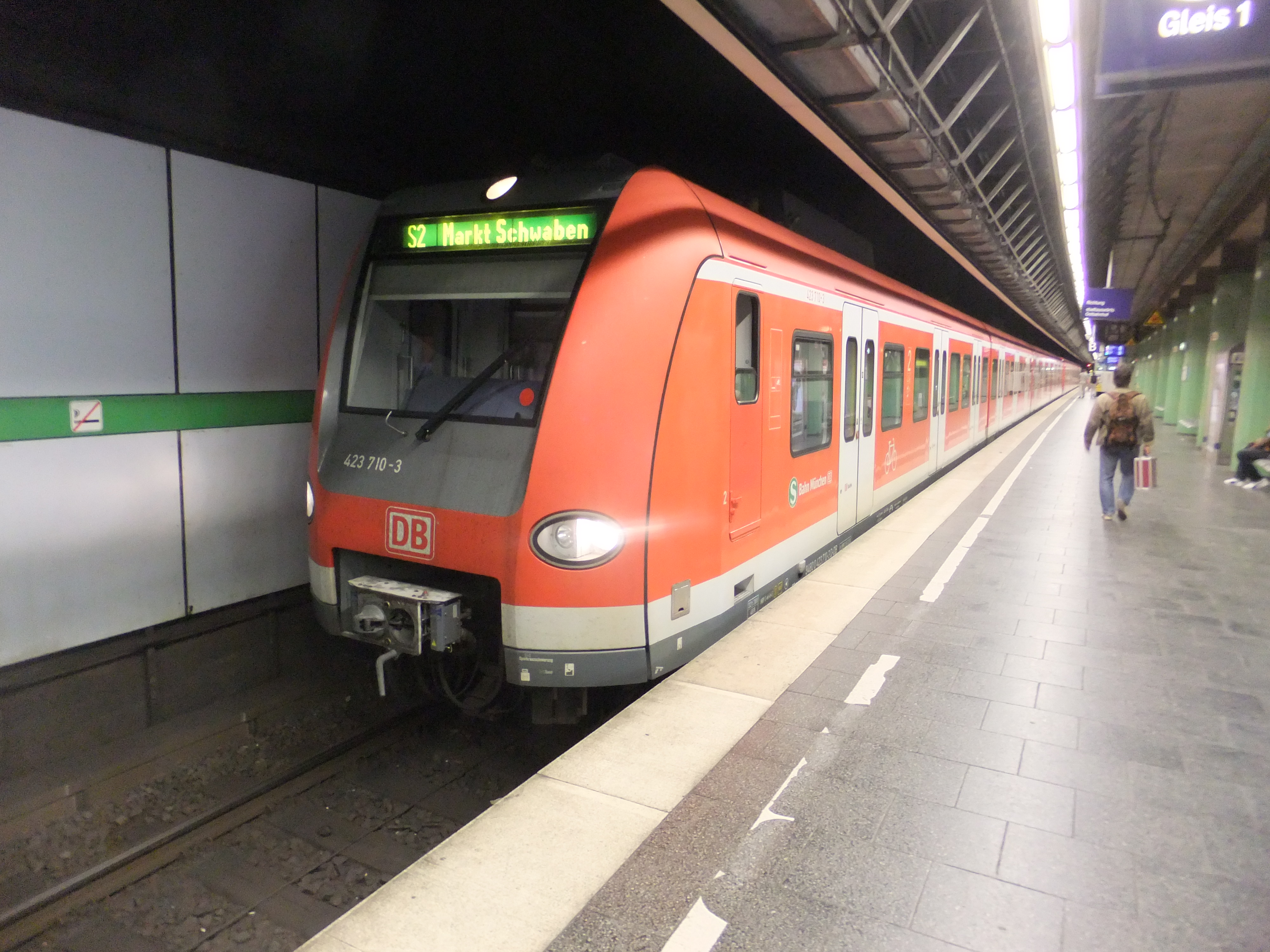 DBAG-Baureihe 423 der S-Bahn München auf der Linie S2 im Bahnhof München Isartor